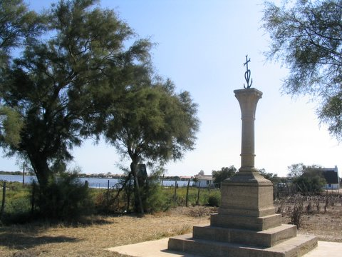 Croix camarguaise aux Saintes-Maries-de-la-Mer - Bouches-du-Rhône, France